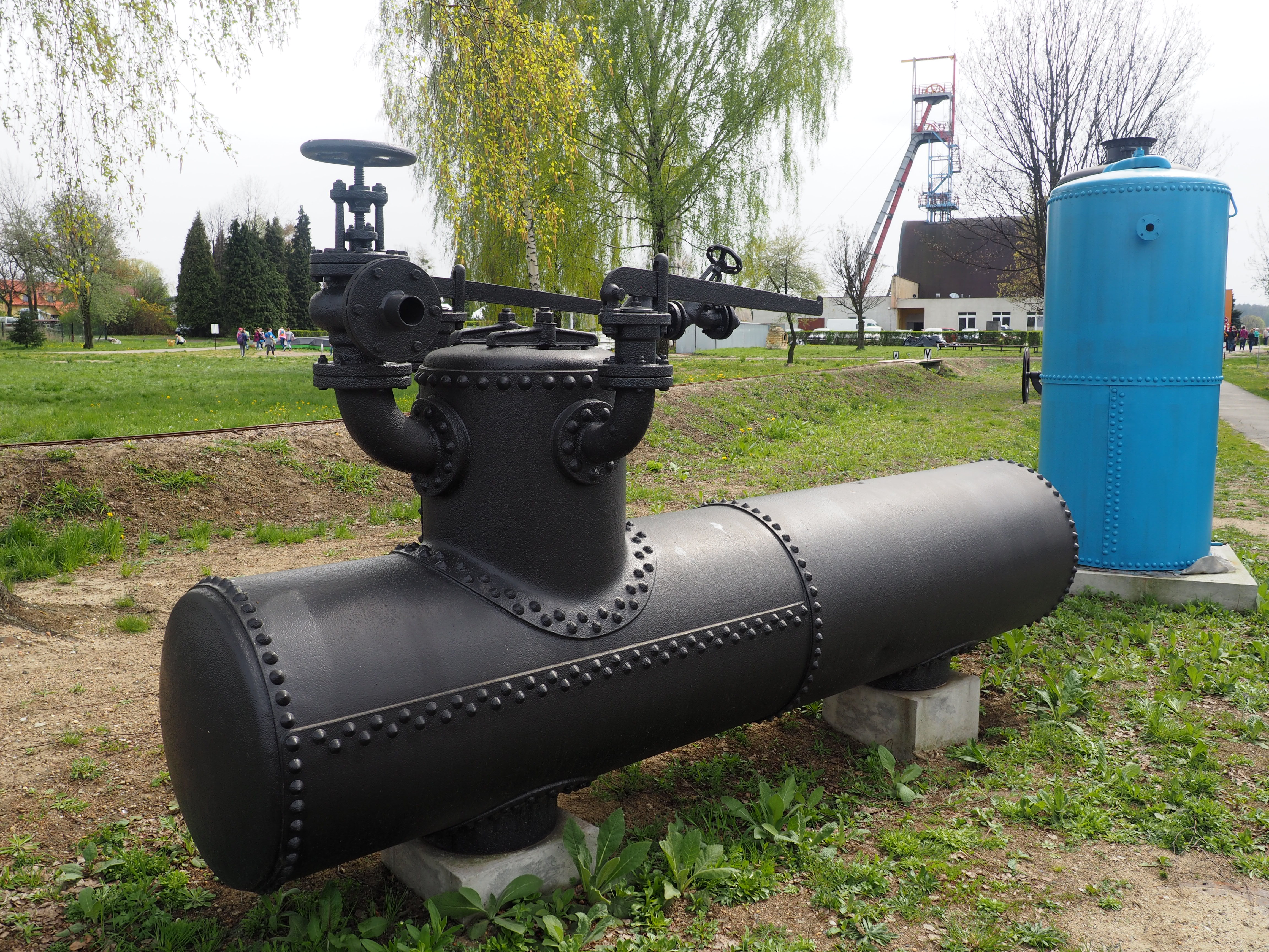 Kocioł parowy (walczak) jednopłomieniowy z 1910 roku. Eksponat na terenie Skansenu maszyn Parowych w Tarnowskich Górach